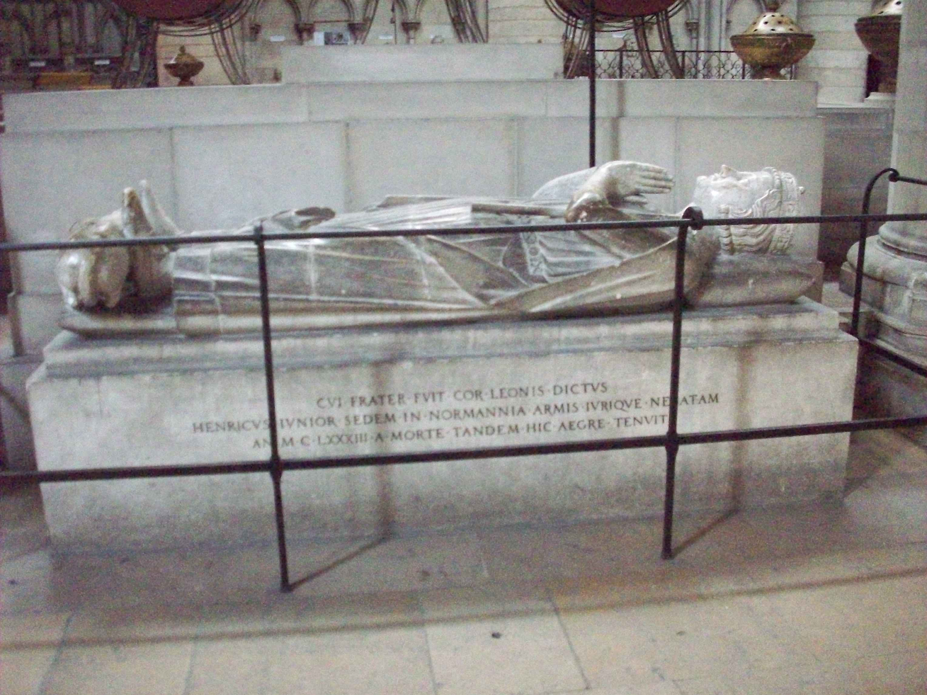 Gisant d'Henri le Jeune, frère de Richard Coeur de Lion.